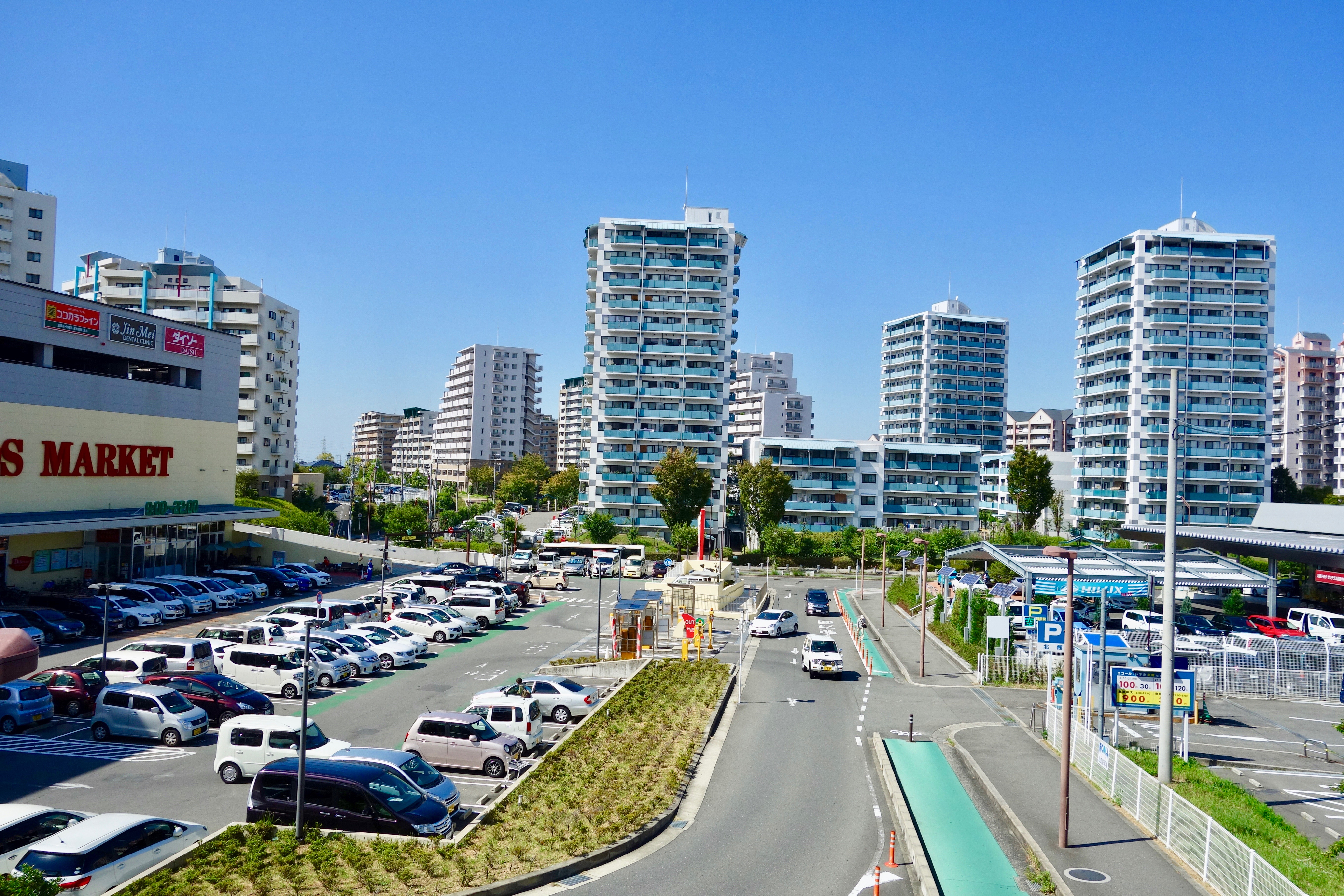 和泉中央駅からマンション群